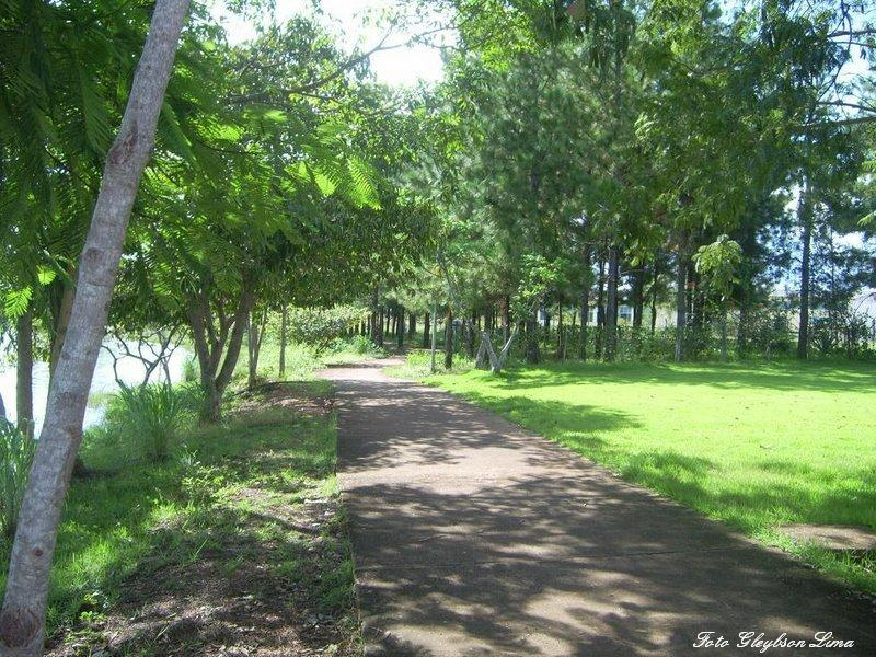 Foto-Passarela do Lago Municipal